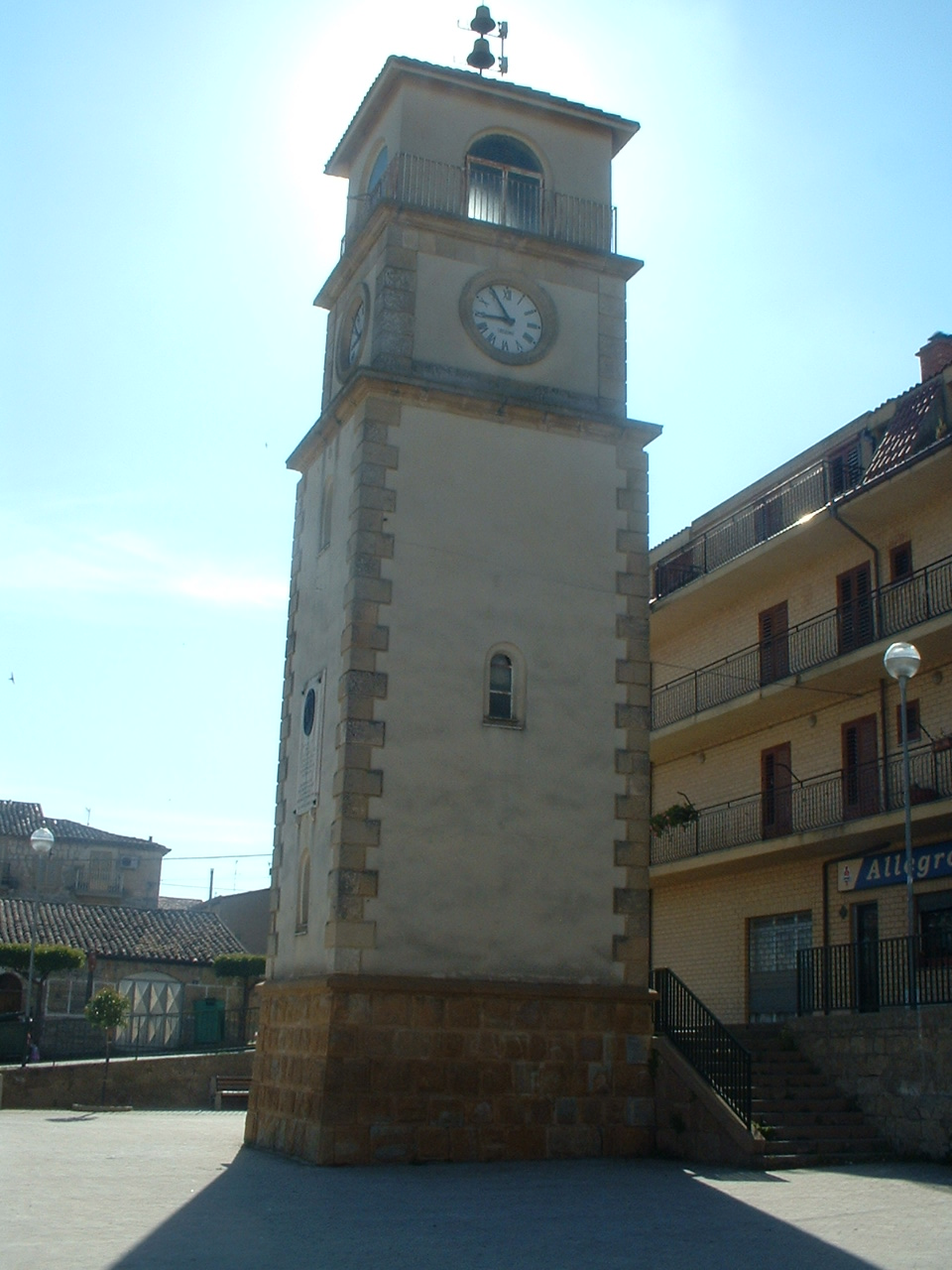 Villapriolo (Villarosa-EN), Torre Civica dell'orologio.